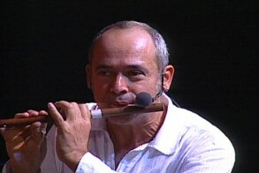 Cantor brasileiro Carlos Malta em imagem do acervo da TV Brasil.